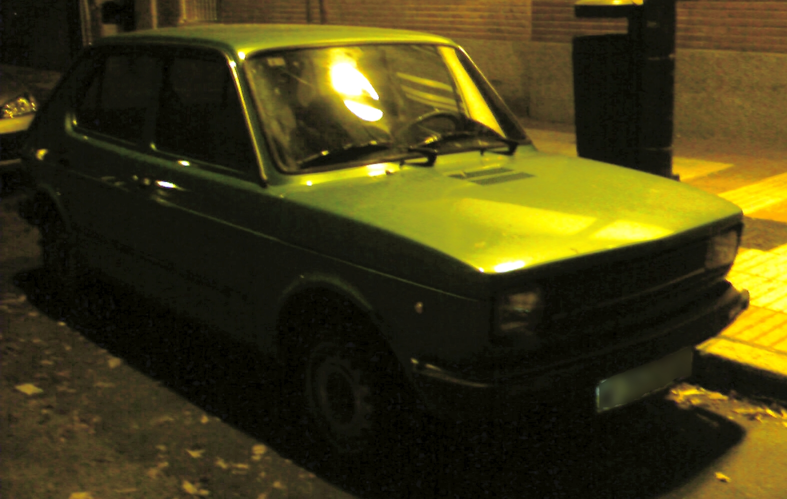 SEAT 127